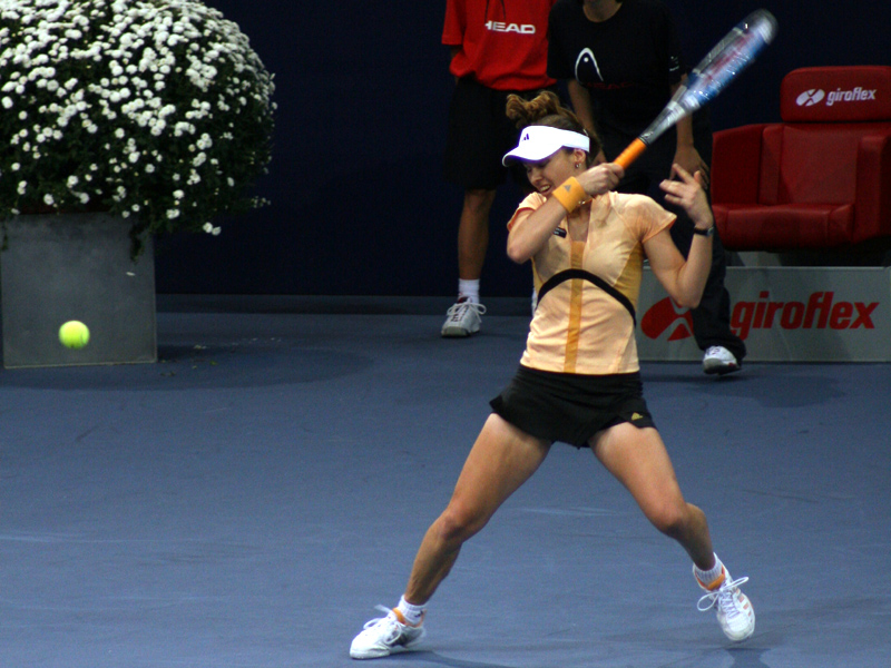 Martina Hingis am Zürich Open 2006